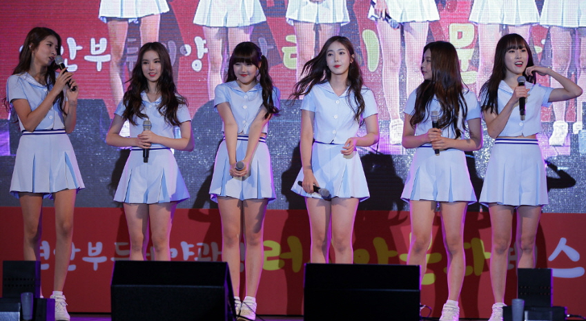 여자친구(GFRIEND) 러시아 문화 페스티벌 인천 연안부두 해양광장